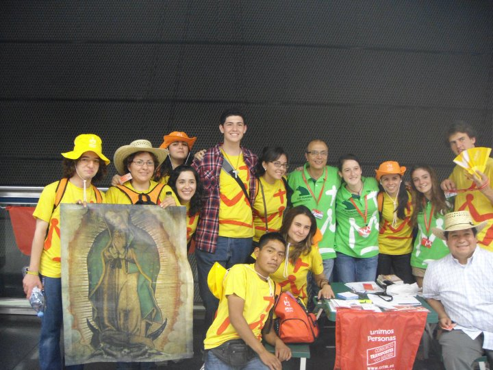 jmj 2011